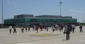 Valladolid Airport